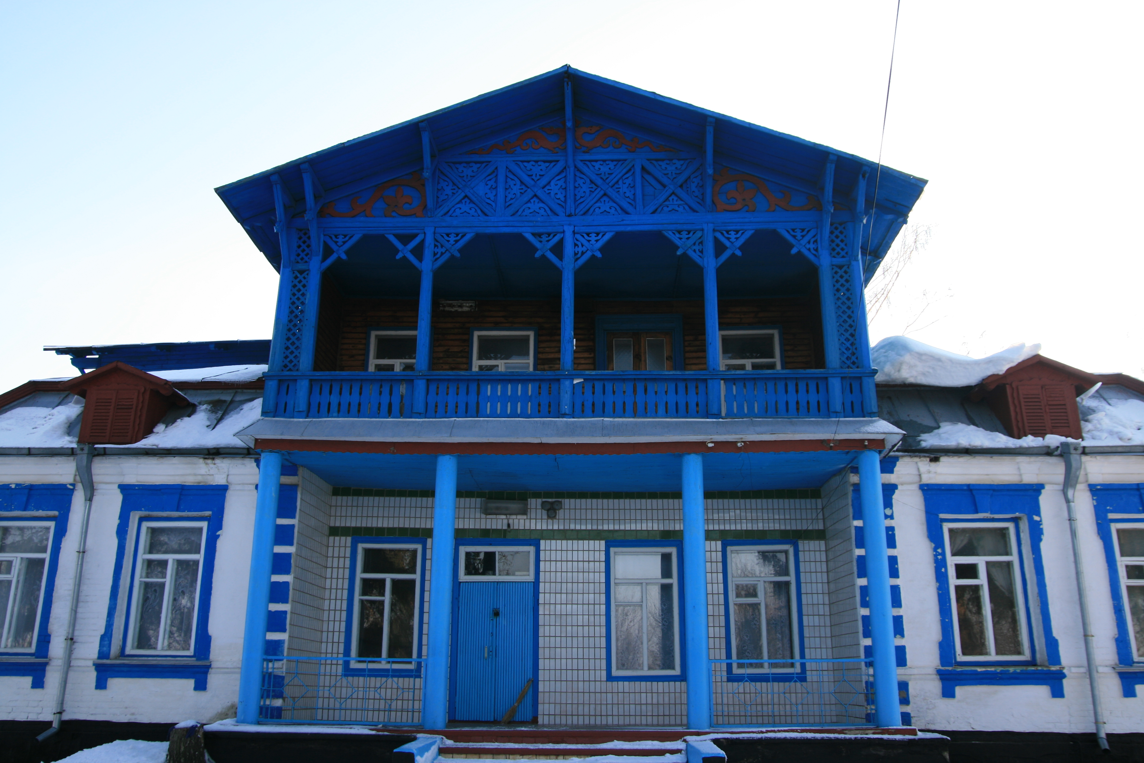 Садибний будинок (мур.), село Погреби